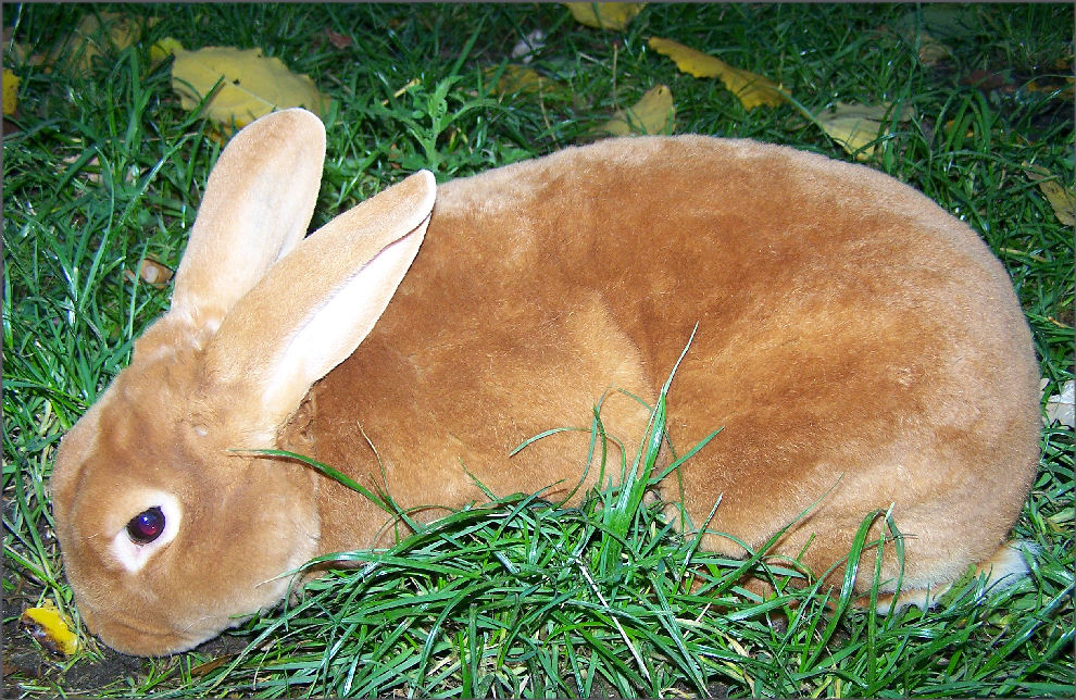 Gelb - Rex, Rassenkaninchen, 1,0